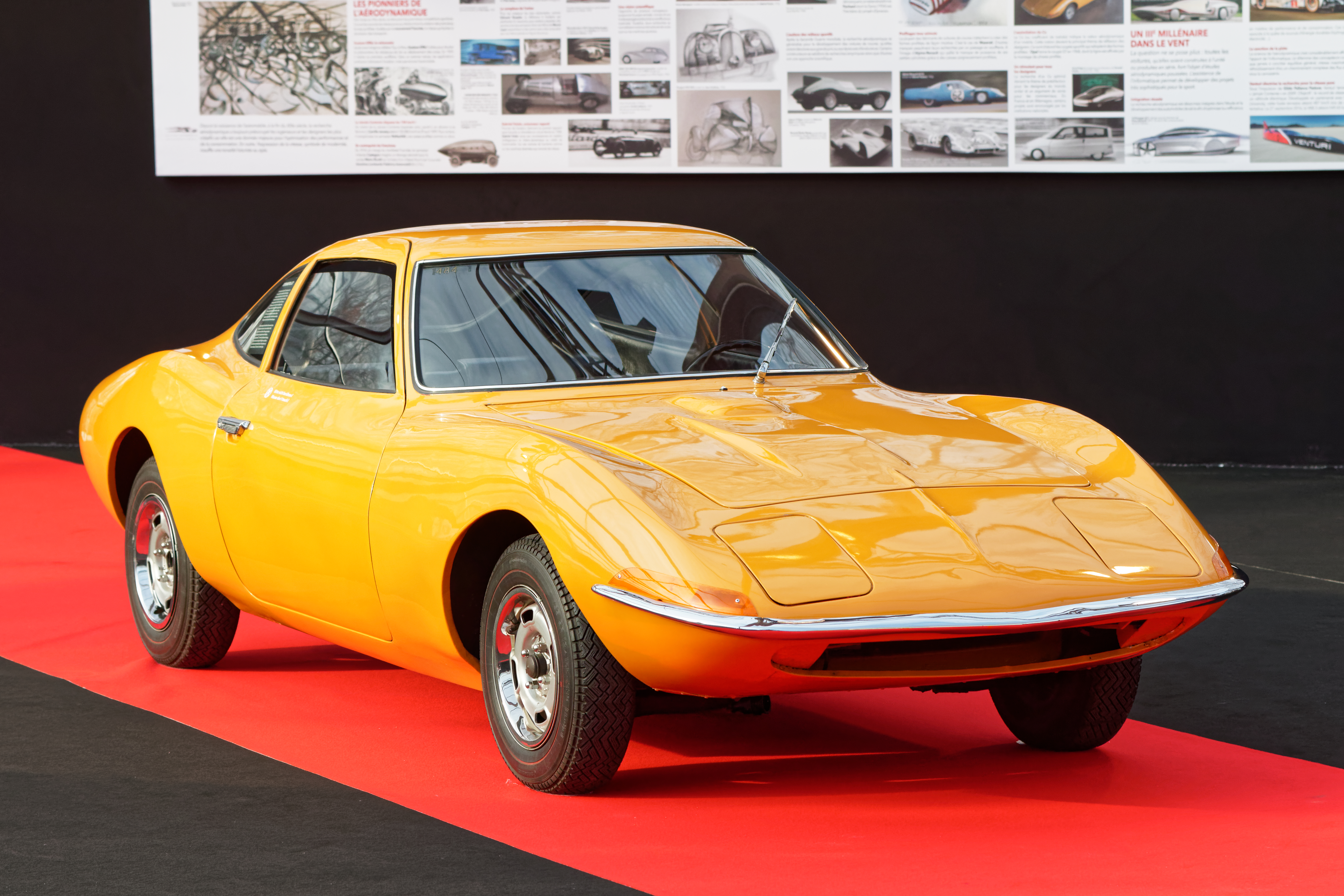 L'Opel GT exposée lors du festival automobile international 2016.